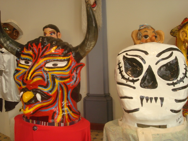 Máscara del Diablo o Cuijen y de la Pelona, elementos de la mascarada tradicional costarricense.